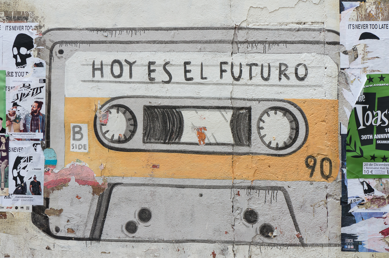 Otra pared es posible - 86